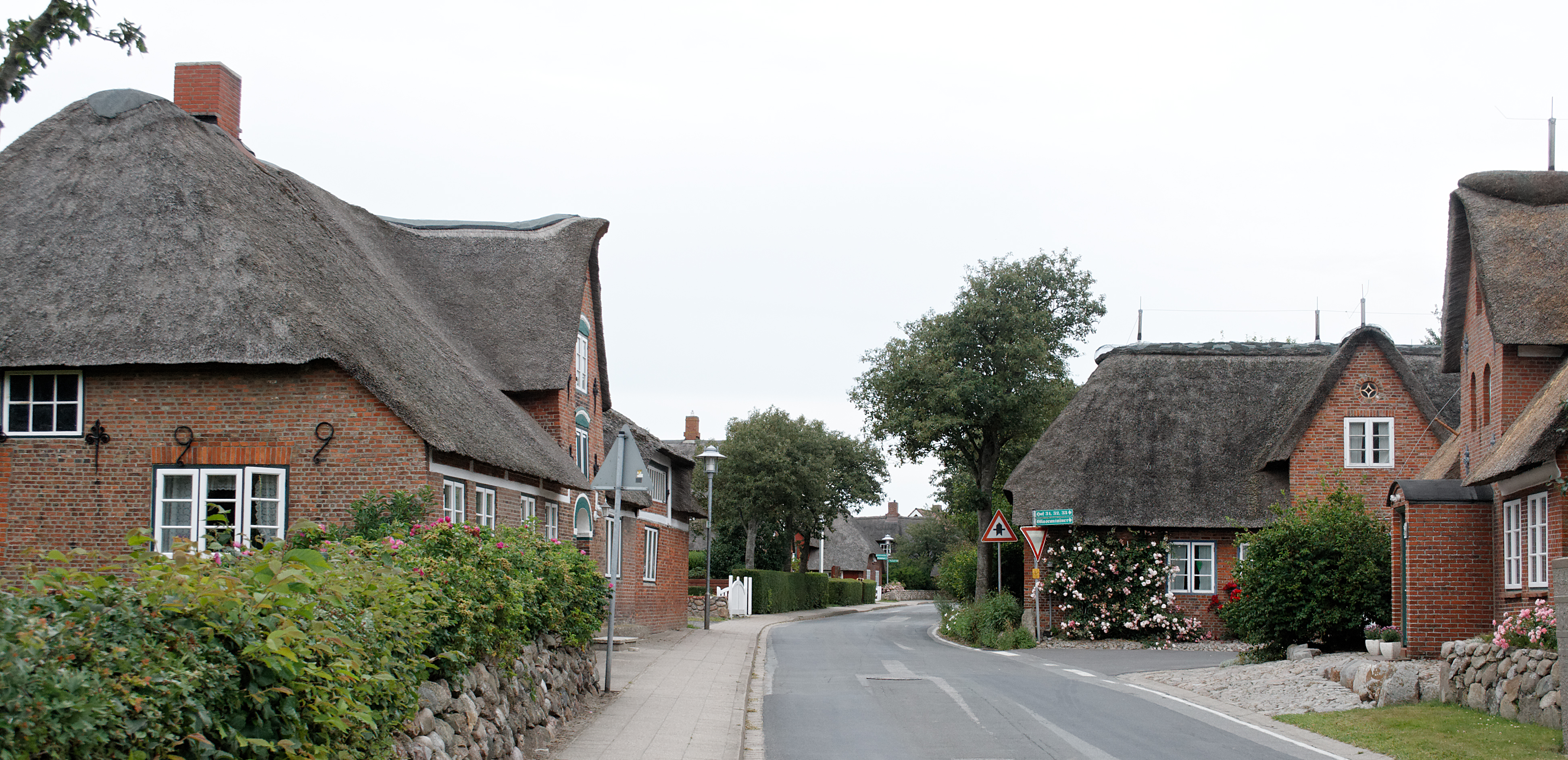 Friesenhäuser in Süderende, Insel Föhr.